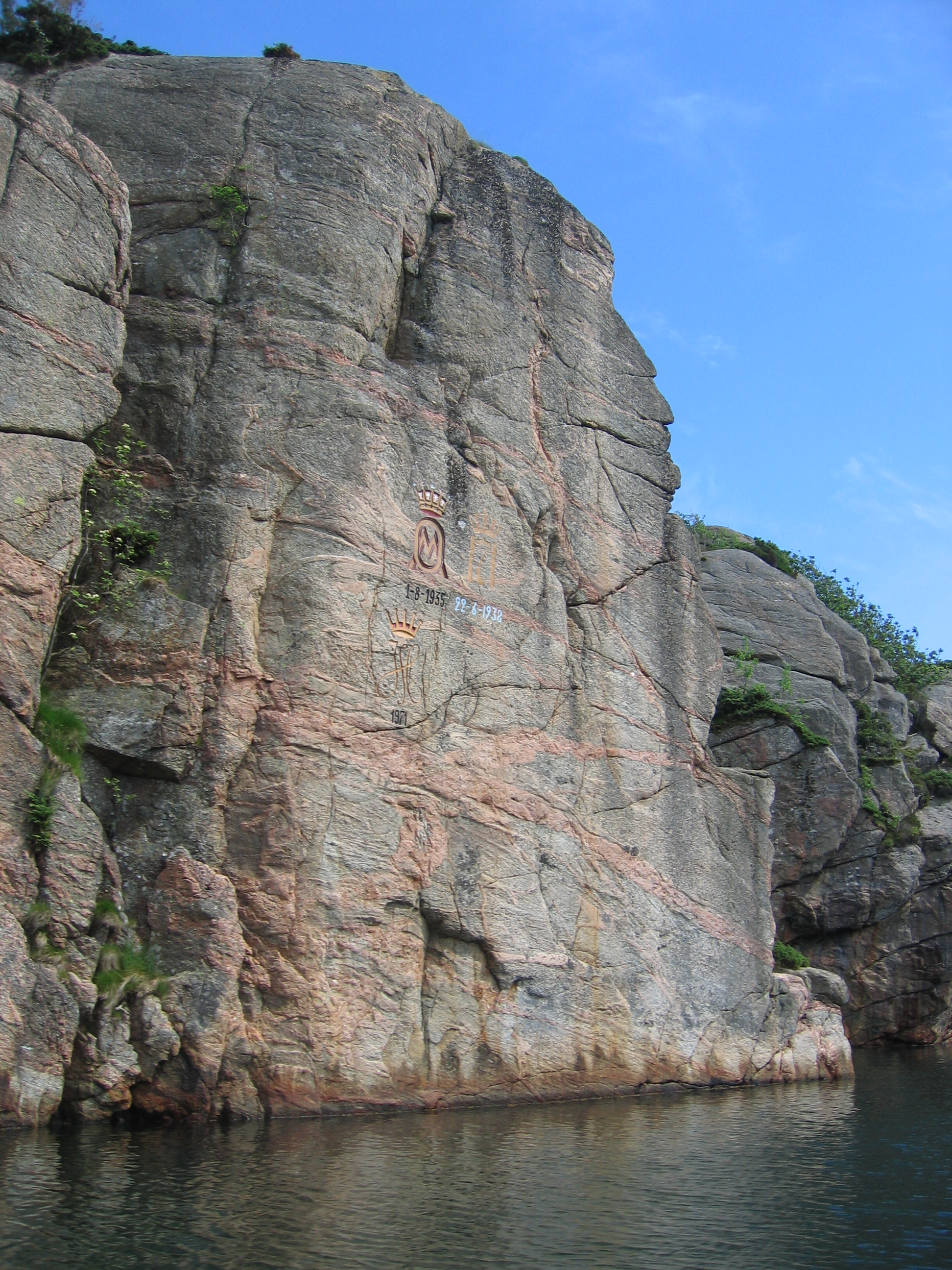 St.Olavs sund i Ny-Hellesund